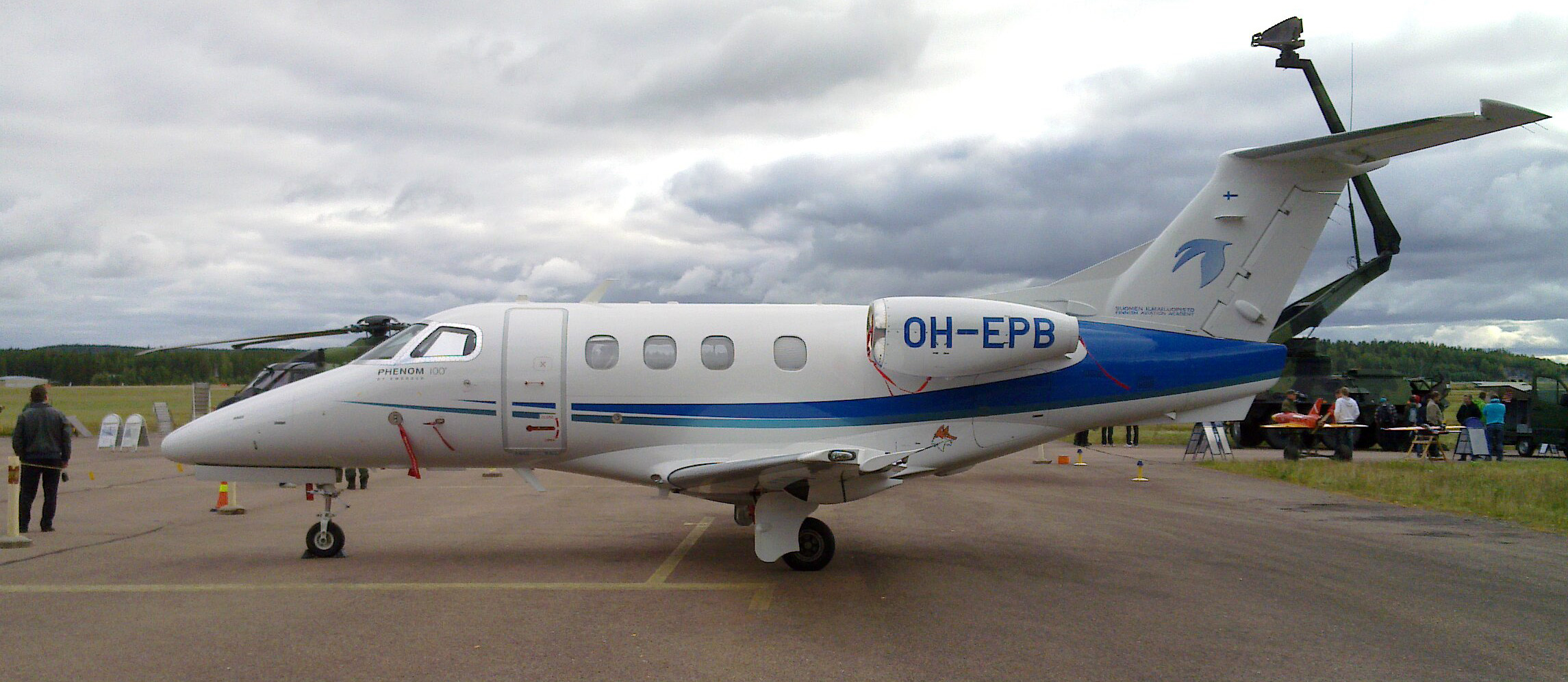 Suomen Ilmailuopiston Embraer Phenom 100 (OH-EPB) "Kettu" Jyväskylän lentoasemalla (EFJY) "Ilmailusta ammatti" -tapahtumassa.